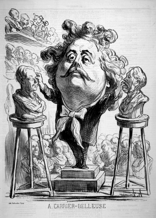 Portrait-charge de Albert-Ernest Carrier-Belleuse